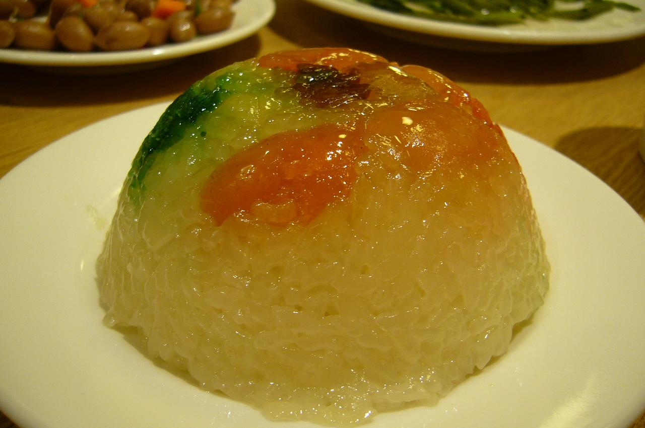 ハッポーもちごめデザート - 八寶飯 - Ba Bao Fan (台湾、台北の鼎泰豊/鼎泰豐/ディンタイフォン/Din Tai Fung)